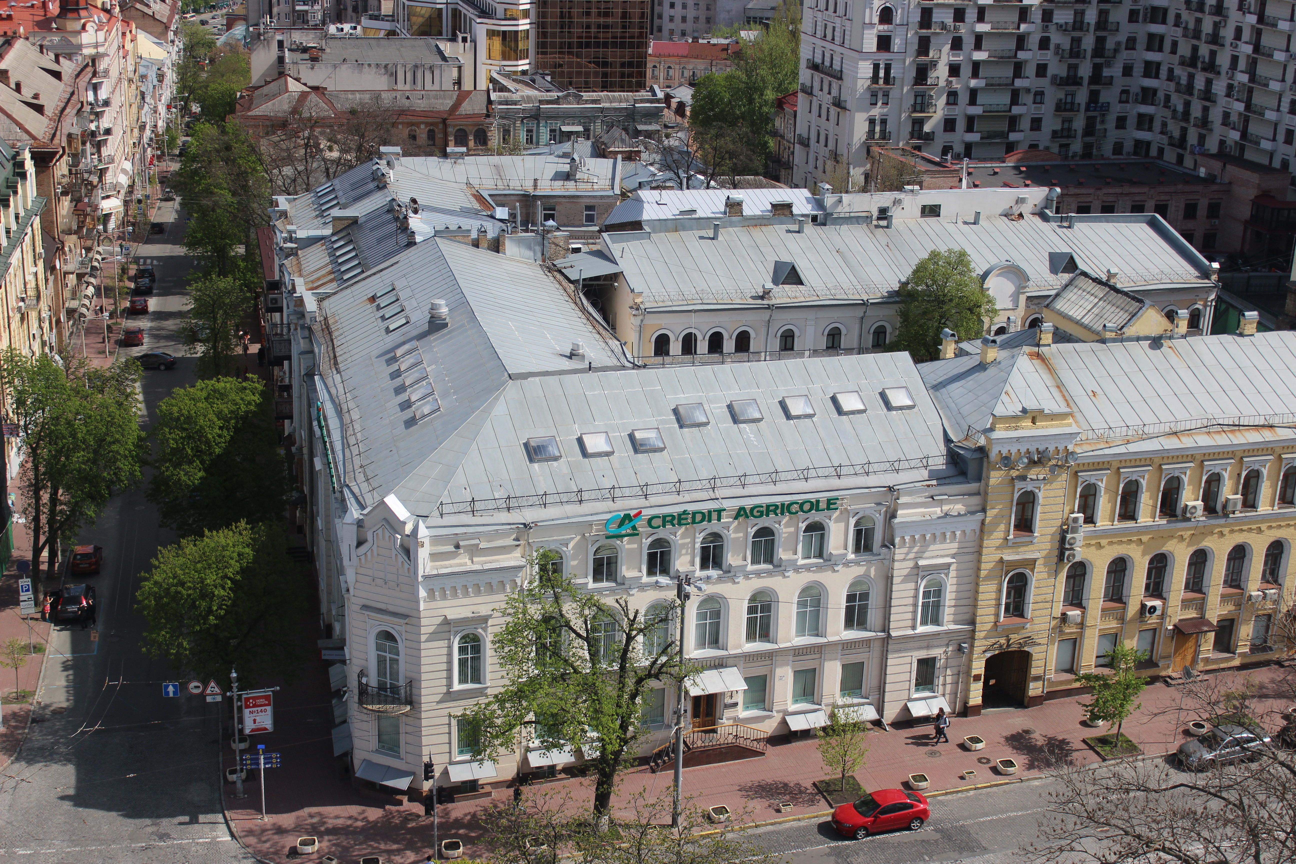 Будинок прибутковий купця Ф. Міхельсона, Київ, Володимирська вул., 23/27